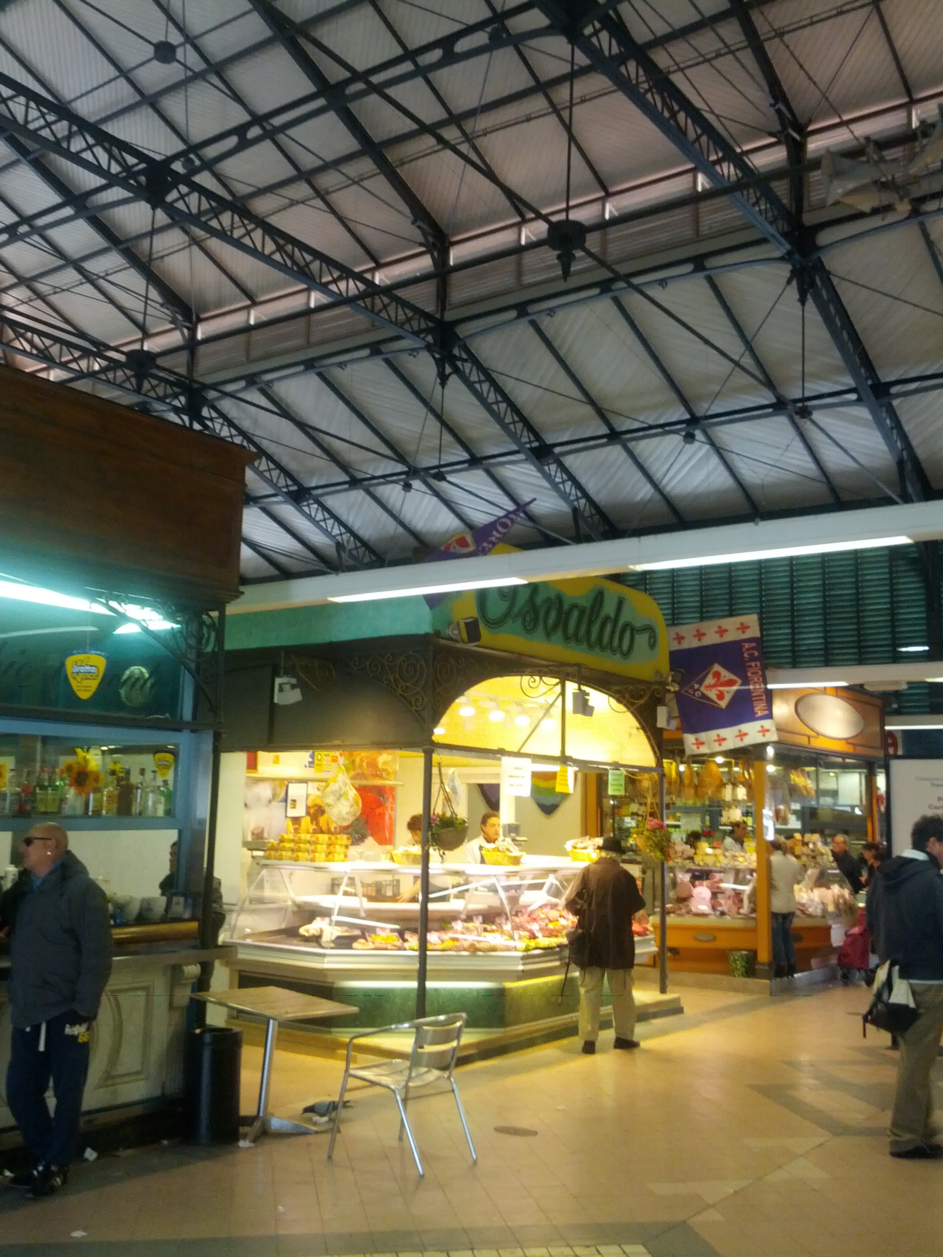 Mercato di sant'ambrogio, interno